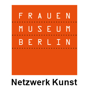 Logo des Frauenmuseum Berlin